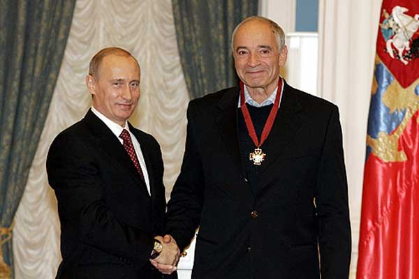 Валентин Гафт